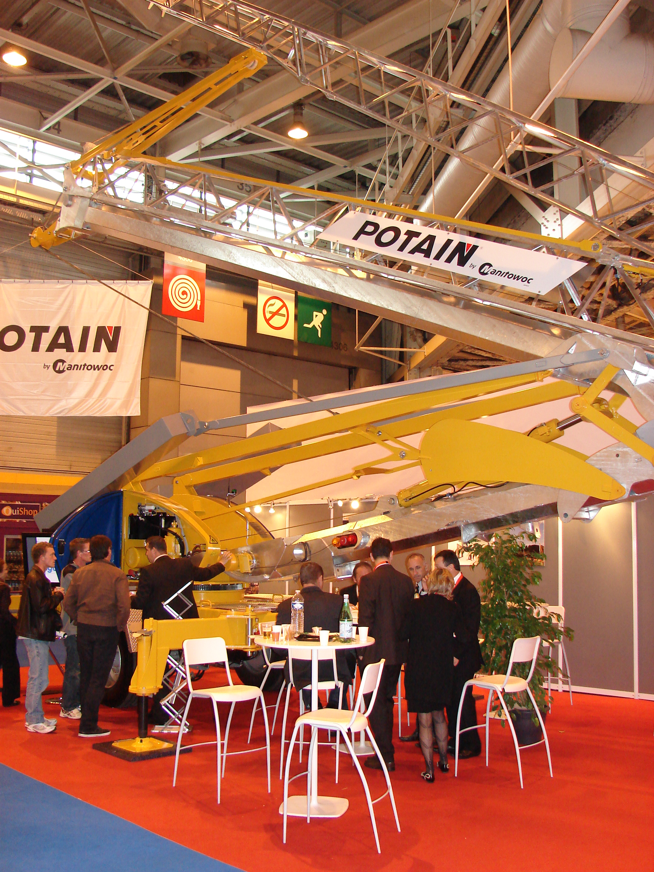 Grue Potain à Batimat (Vue intérieure du parc des expositions de la porte de Versailles)